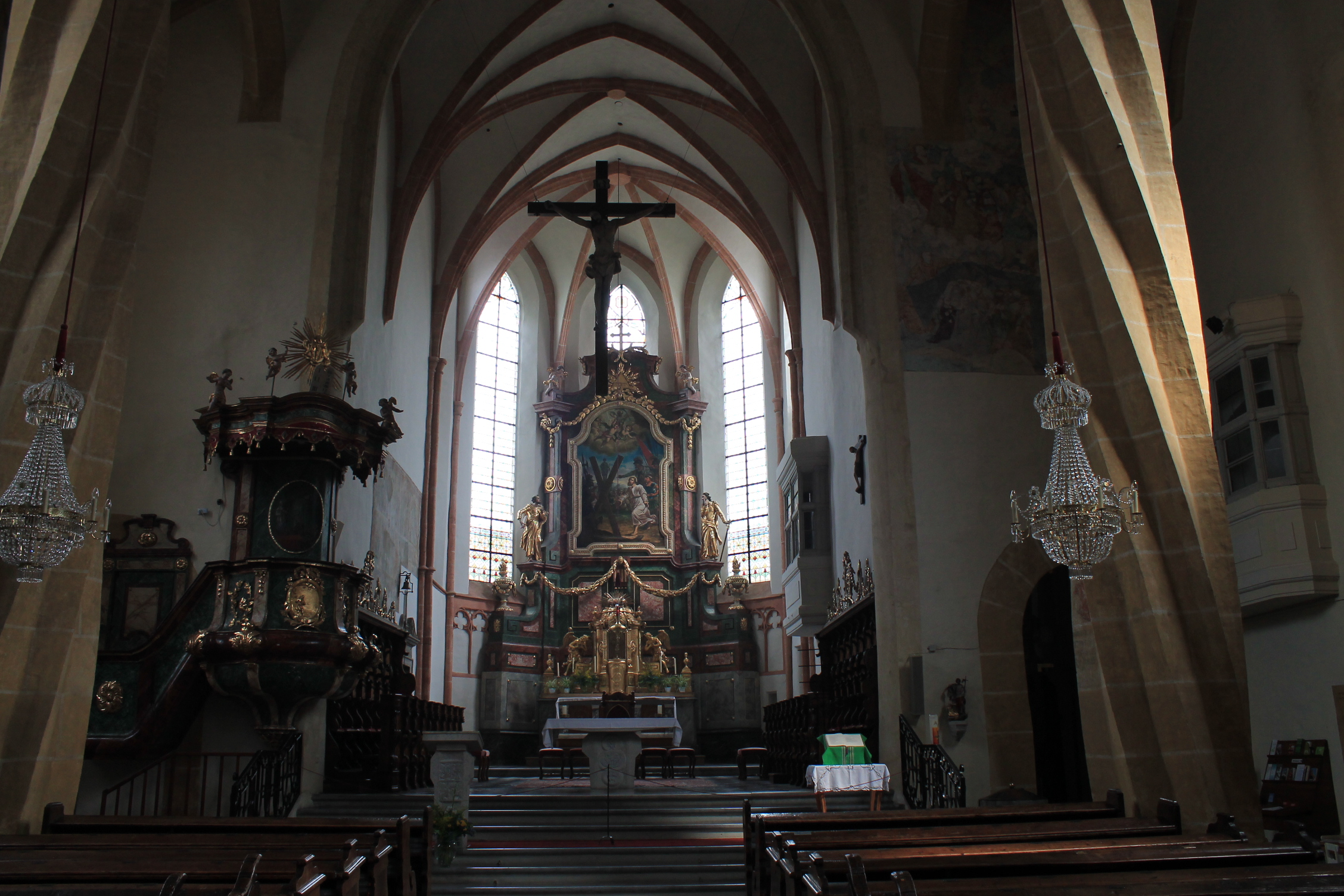 Göß, Kath. Pfarrkirche, ehem. Stiftskirche Göß Hauptaltar